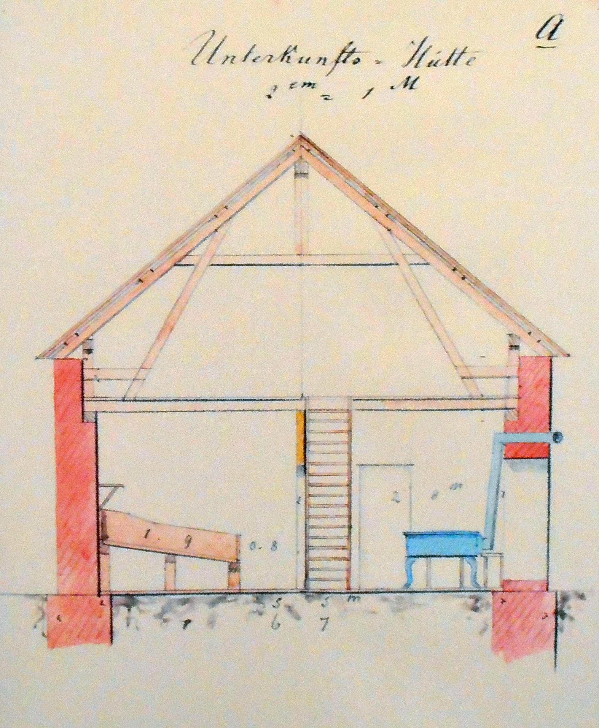 Musterplan für eine Schutzhütte, aquarellierte Zeichnung für die Zeitschrift des Deutschen und österreichischen Alpenvereins